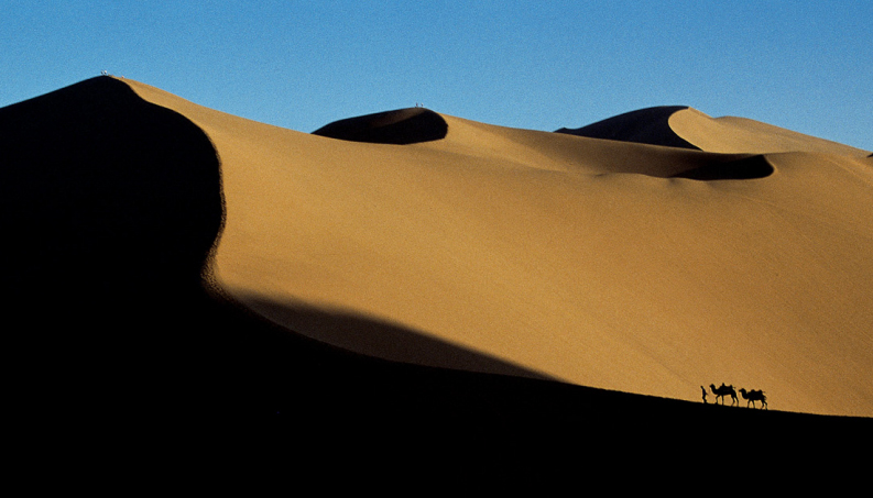 中文（中国大陆）: 沙漠，摄于甘肃敦煌附近Bân-lâm-gú: Sua-bo̍k, tī Kam-siok Tun-hông hù-kīn hip ê. 沙漠，佇甘肅敦煌附近翕的。